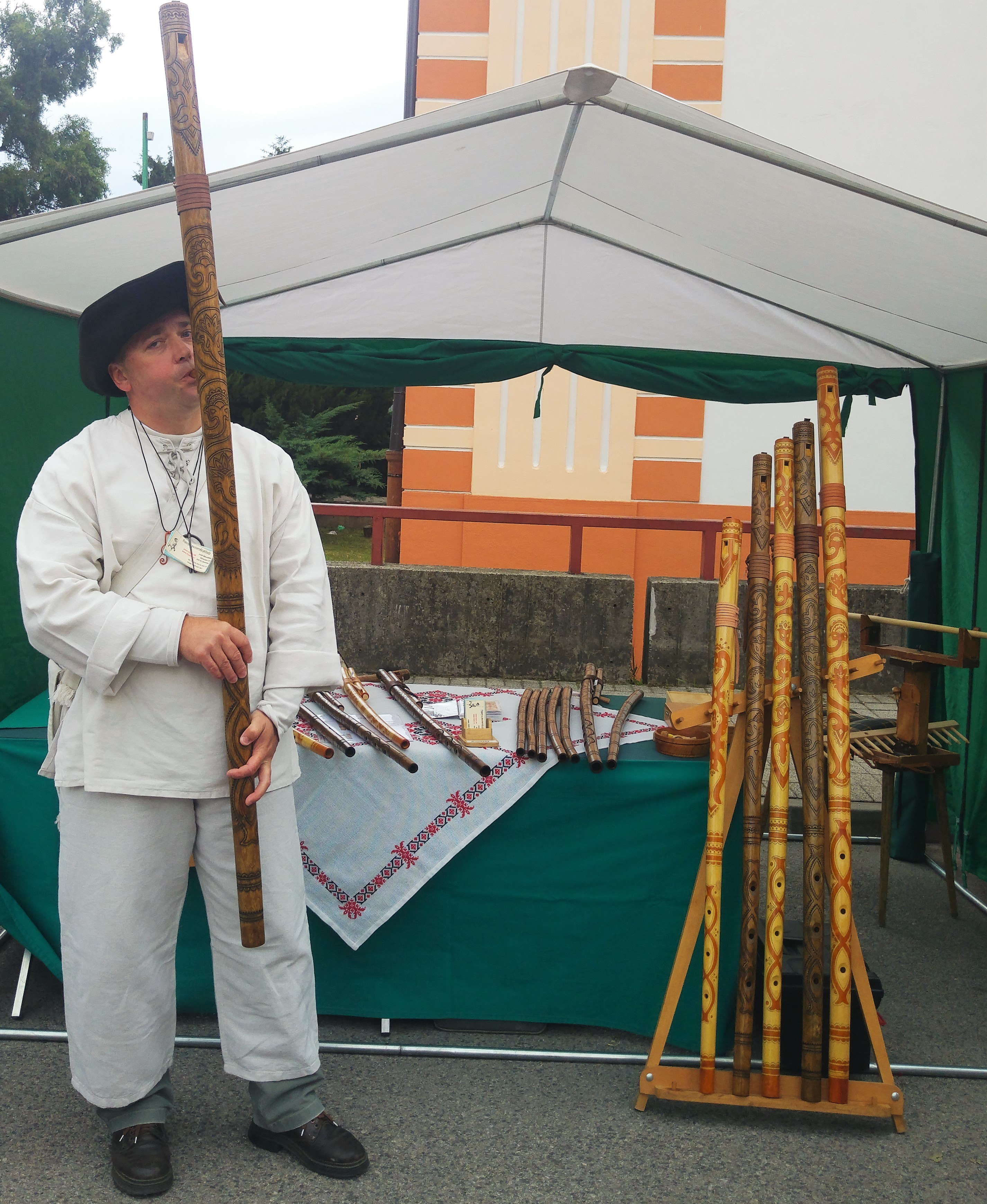 Jozef Mikulasek - twórca fujar słowackich, prezentuje instrumenty i grę na nich podczas festiwalu folklorystycznego w Myjavie, czerwiec 2017